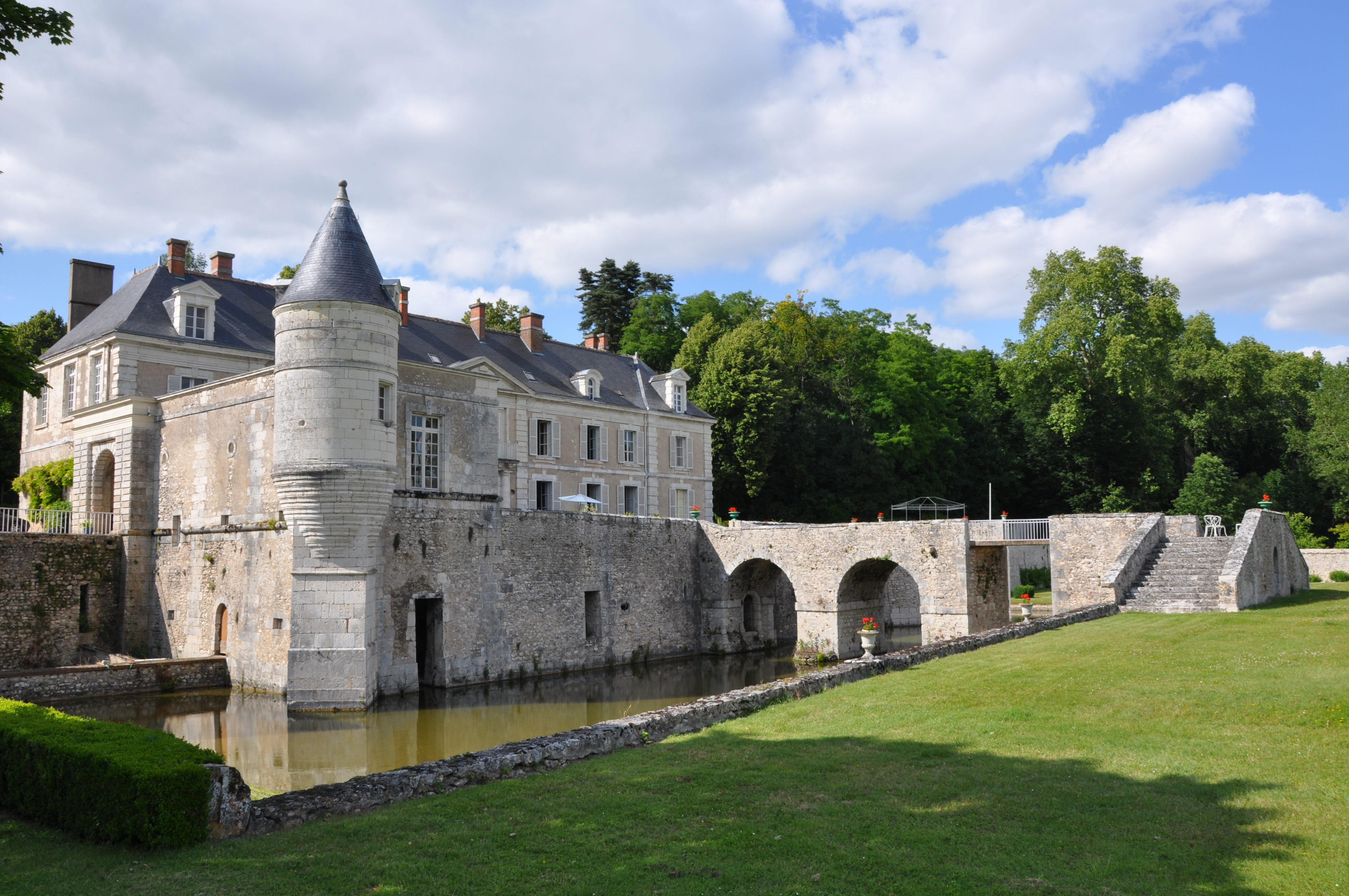 Chateau de Saint Denis sur Loire